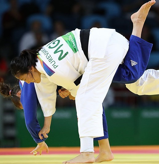 Pürevjargalyn Lkhamdegd